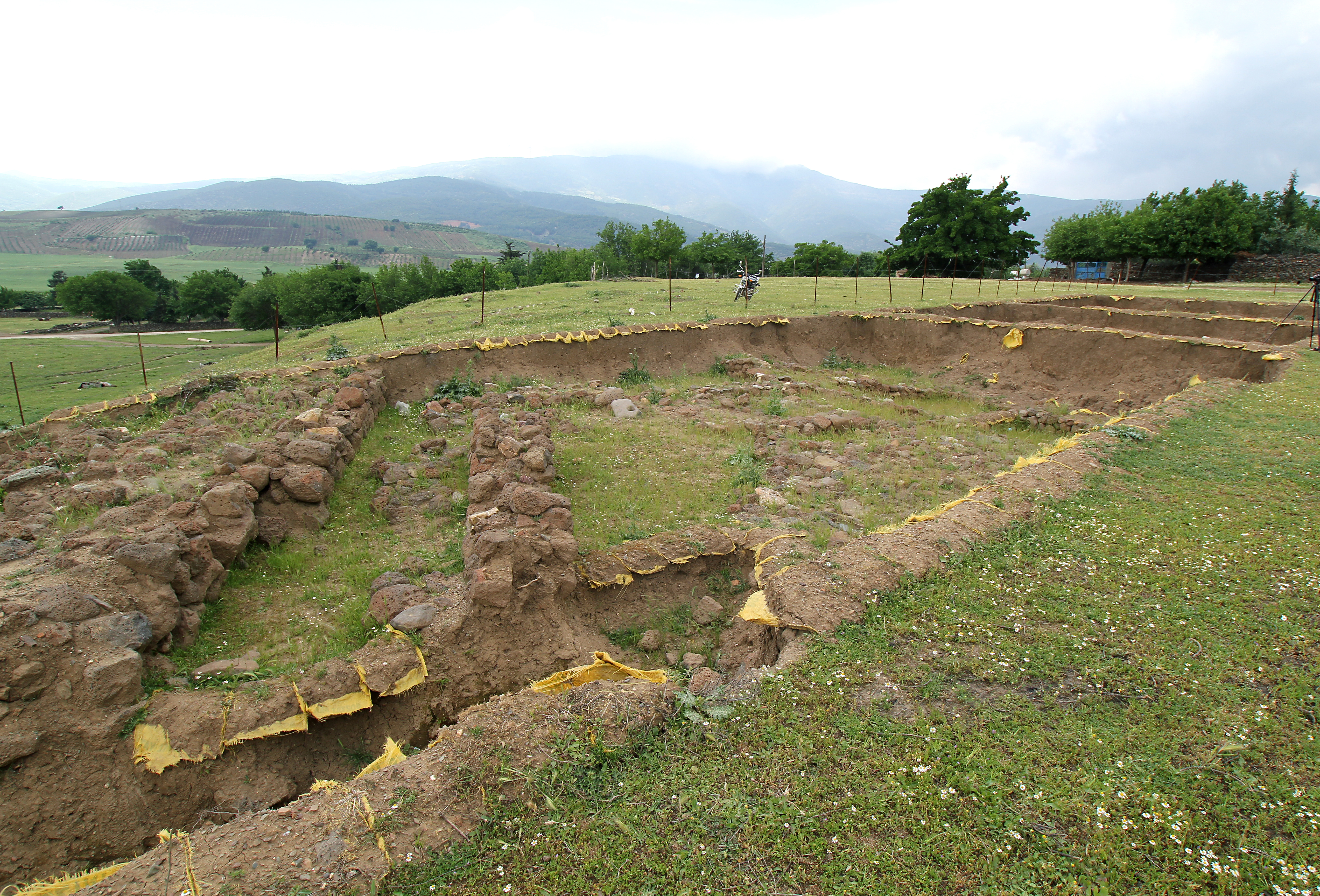 Zincirli (Sam'al), Archäologische Grabungsstelle bei Islahiye, Südtürkei, Grabungsschnitt im Inneren der Zitadelle